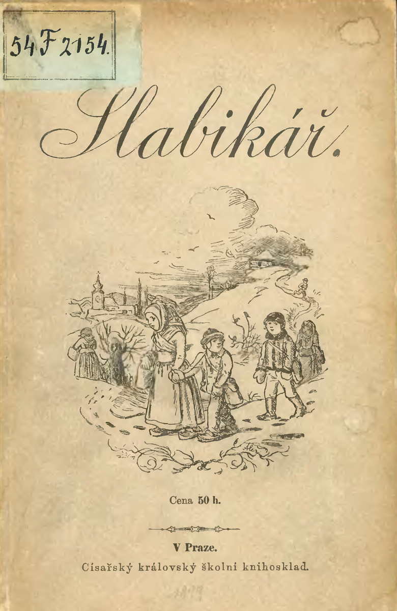 obálka Slabikáře pro školy obecné, ilustroval Mikoláš Aleš